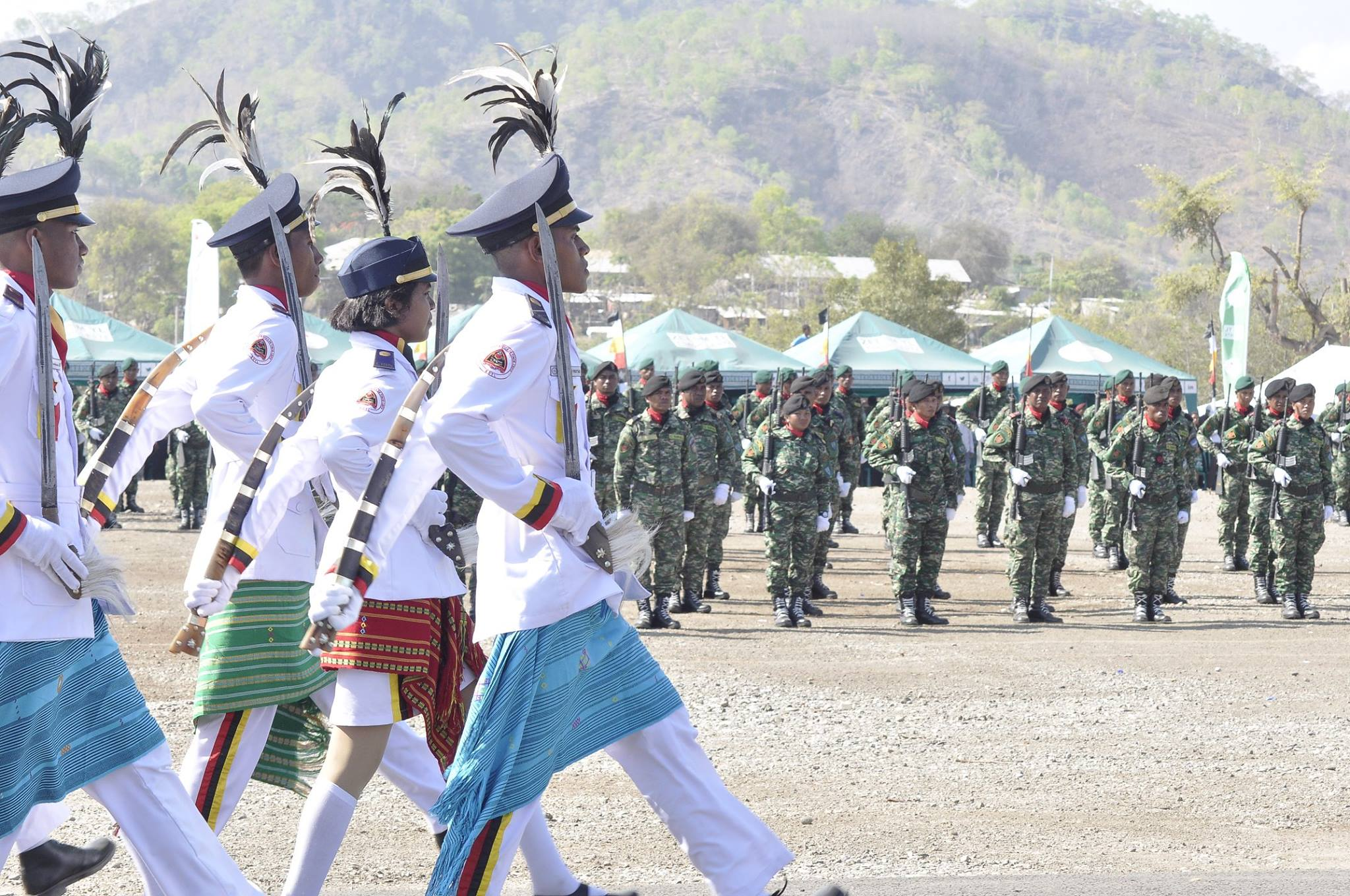 Tetun: Serimónia Komemorasaun Loron Proklamasaun Indpendénte